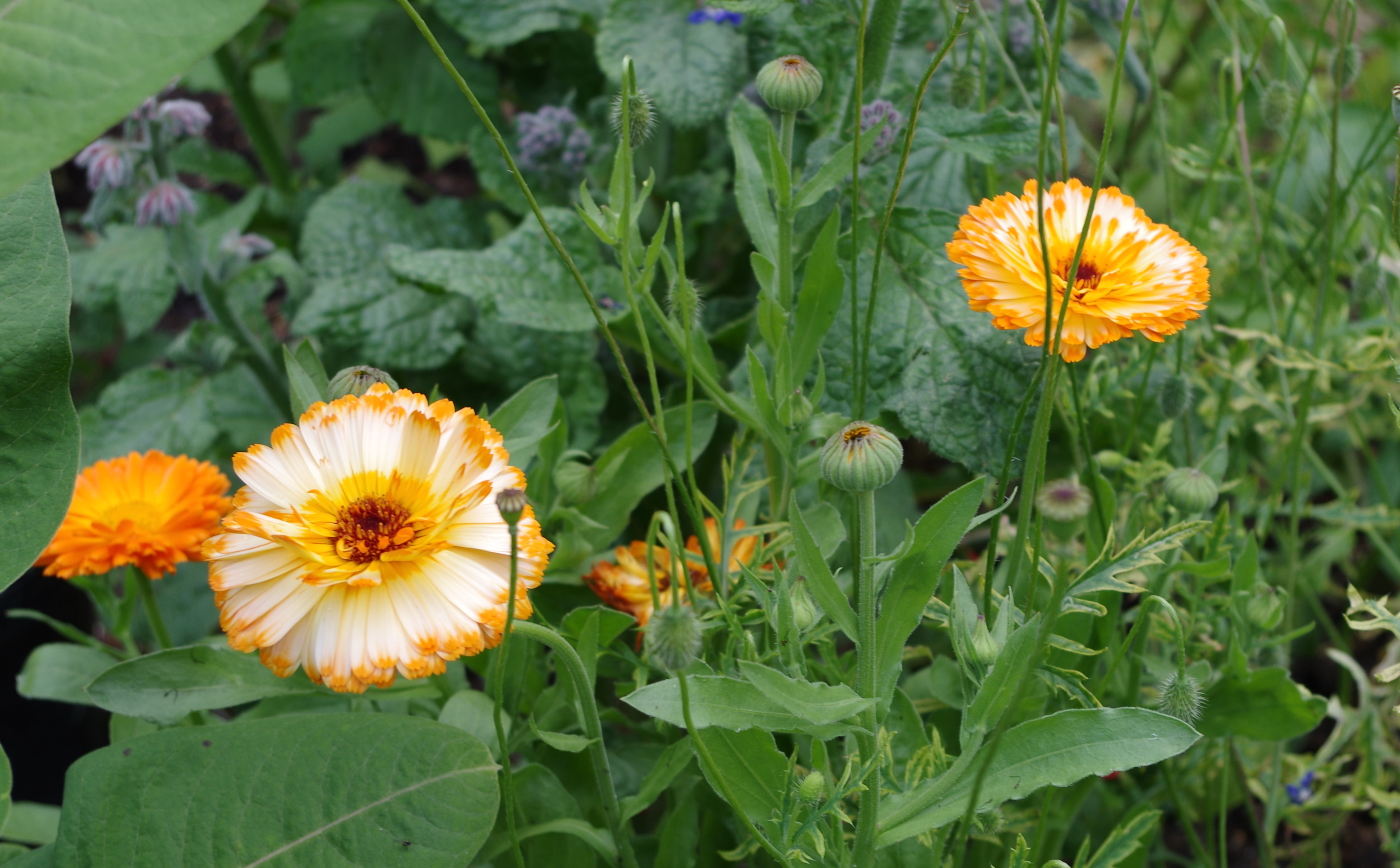 Fleurs bicolores - Parc floral